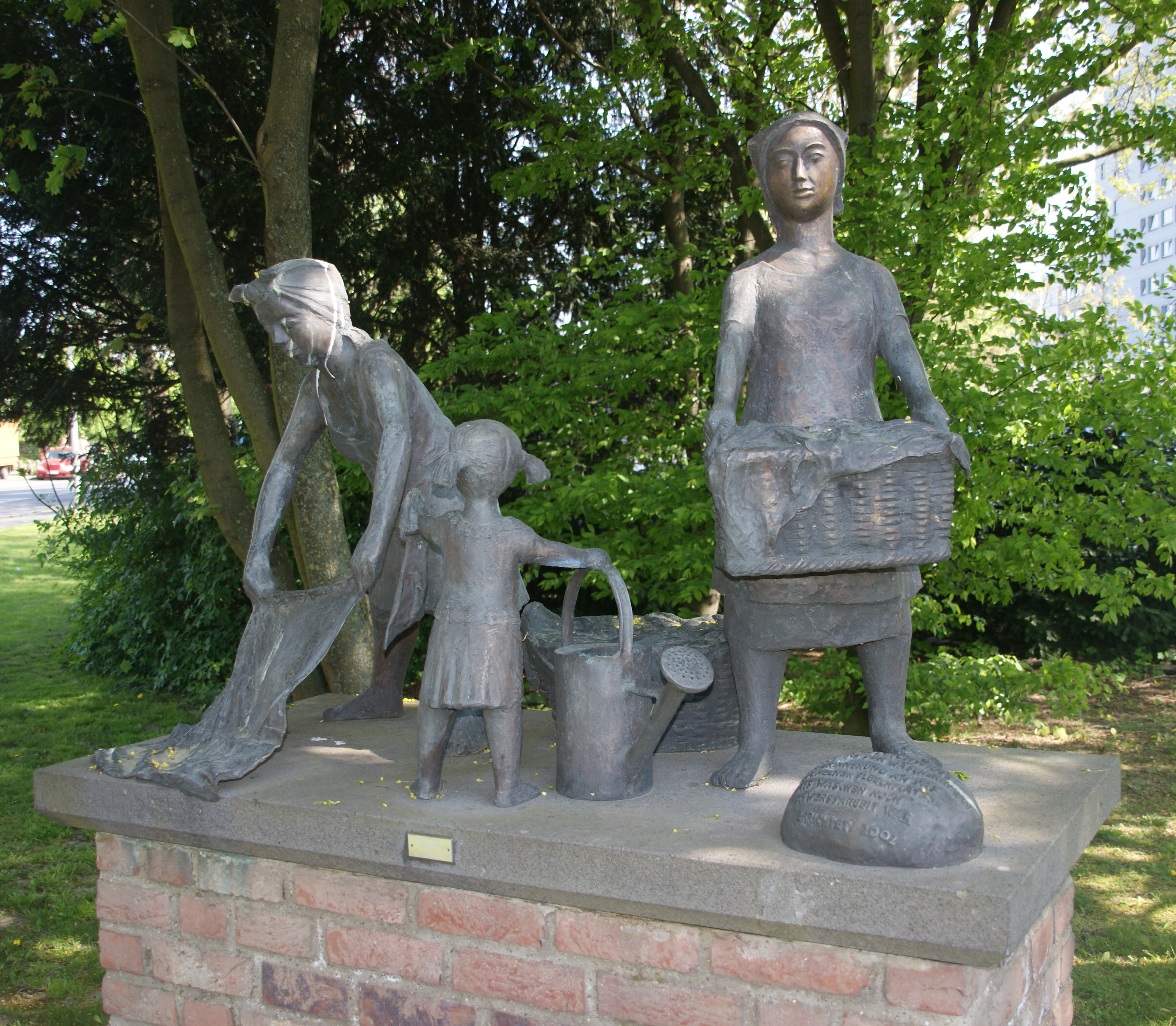 Wäscherinnendenkmal (2002) in Frechen-Hücheln, gestaltet von Olaf Höhnen